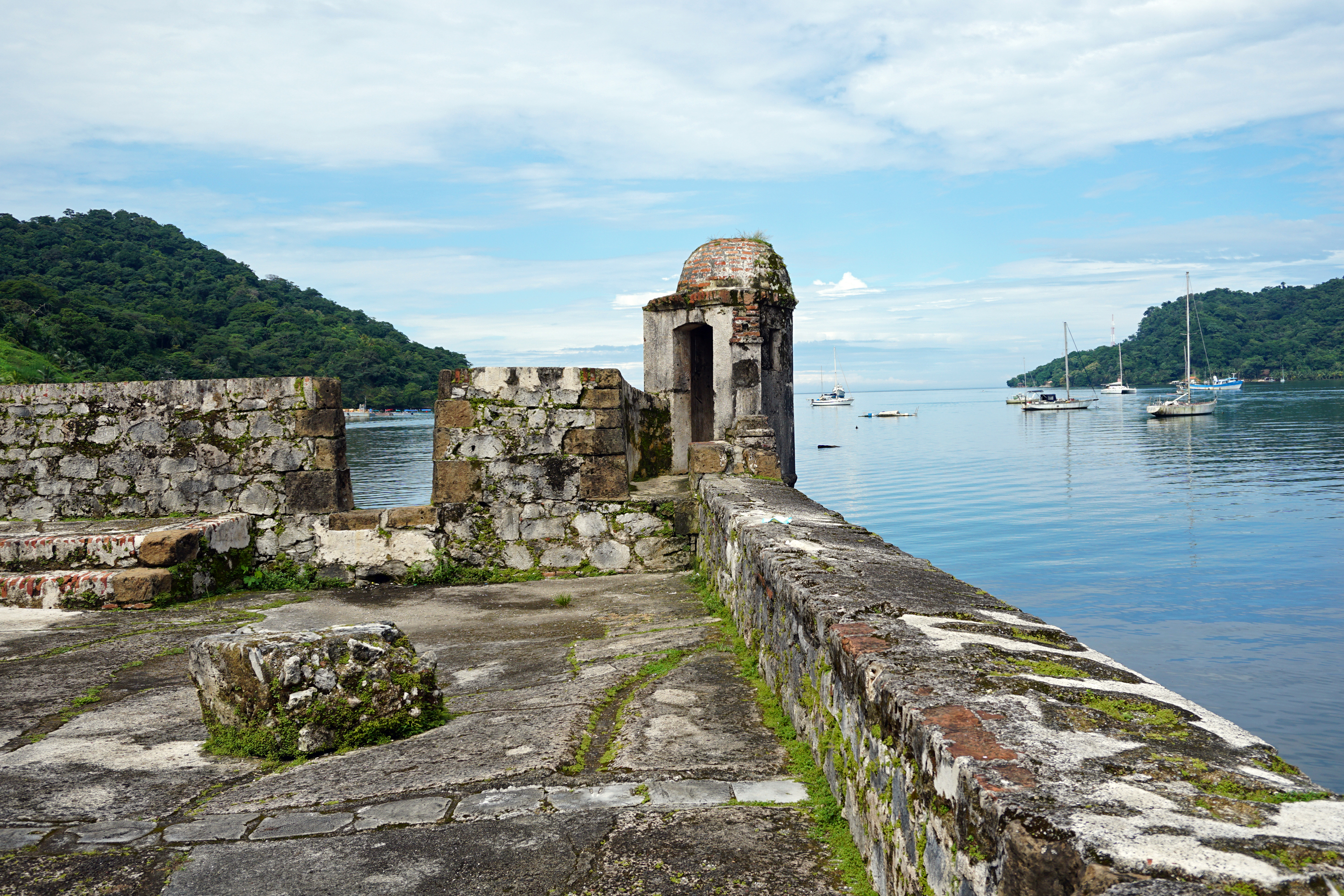 Ruinas del Castillo San Jerónimo, Portobelo, Panamá